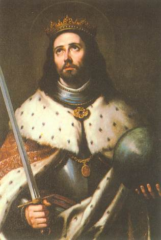 La obra representa al rey Fernando III de Castilla († 1252), apodado el Santo, que fue canonizado por el papa Clemente X en 1671, durante el reinado de Carlos II de España.